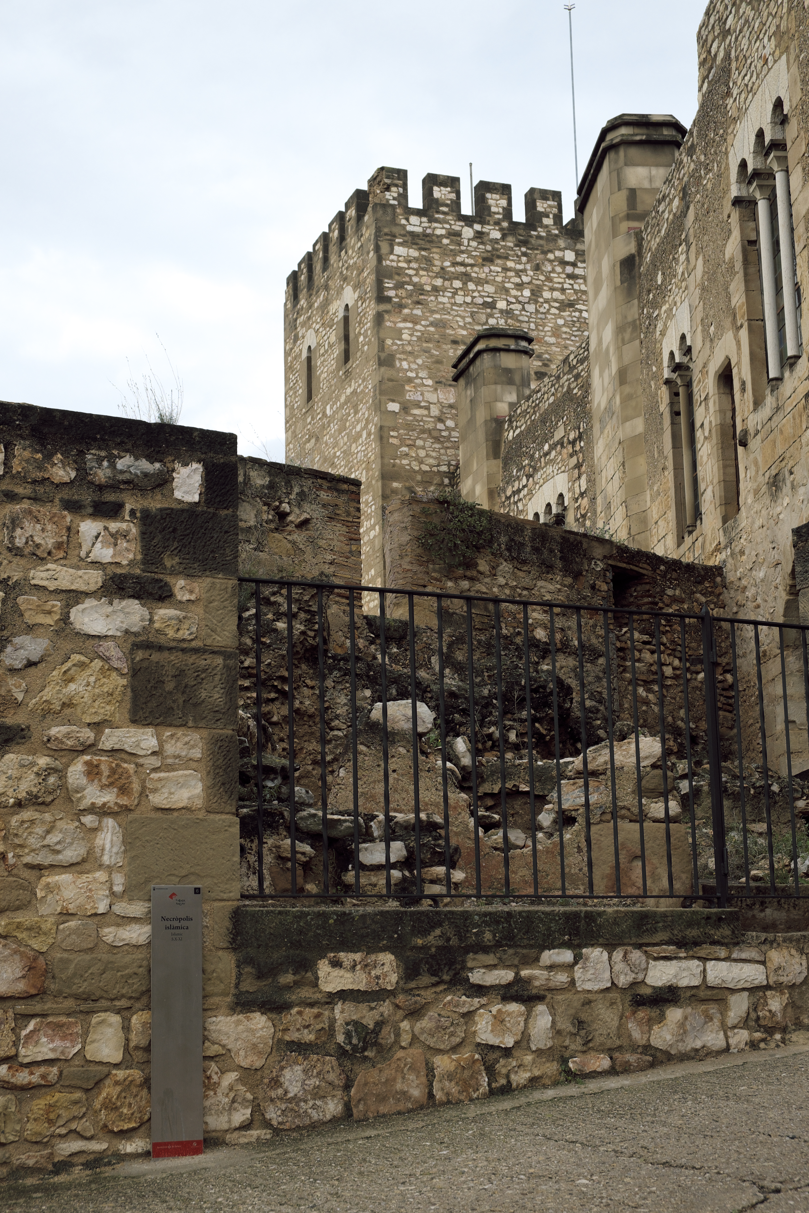 Islamischer Friedhof (Necrópolis islámica) in Tortosa in der Provinz Tarragona (Katalonien/Spanien) auf dem Gelände der Burg (Castillo de la Zuda)